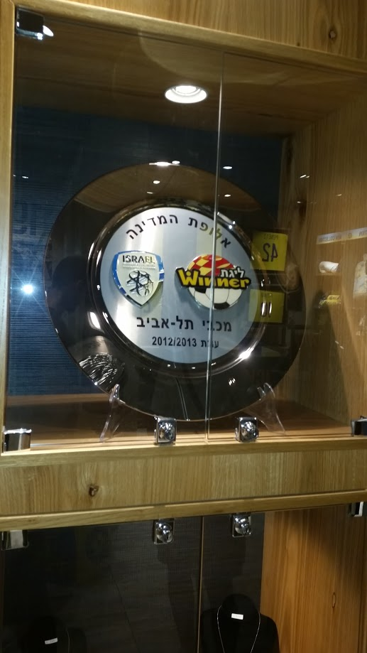 צלחת האליפות של עונת 2013 המוצבת בחנות מכבי תל אביב ברחוב דיזינגוף